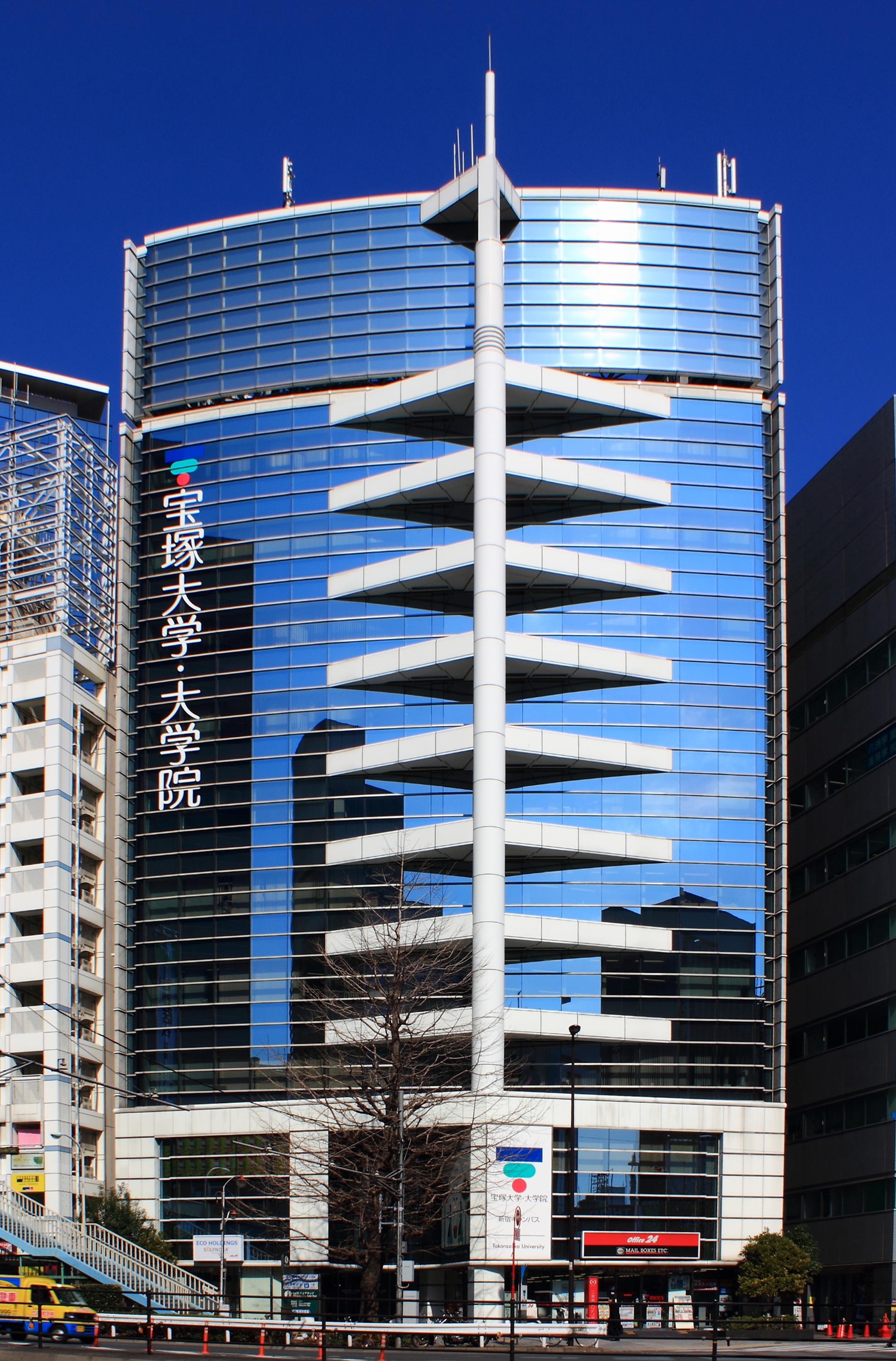 宝塚大学、東京新宿キャンパス